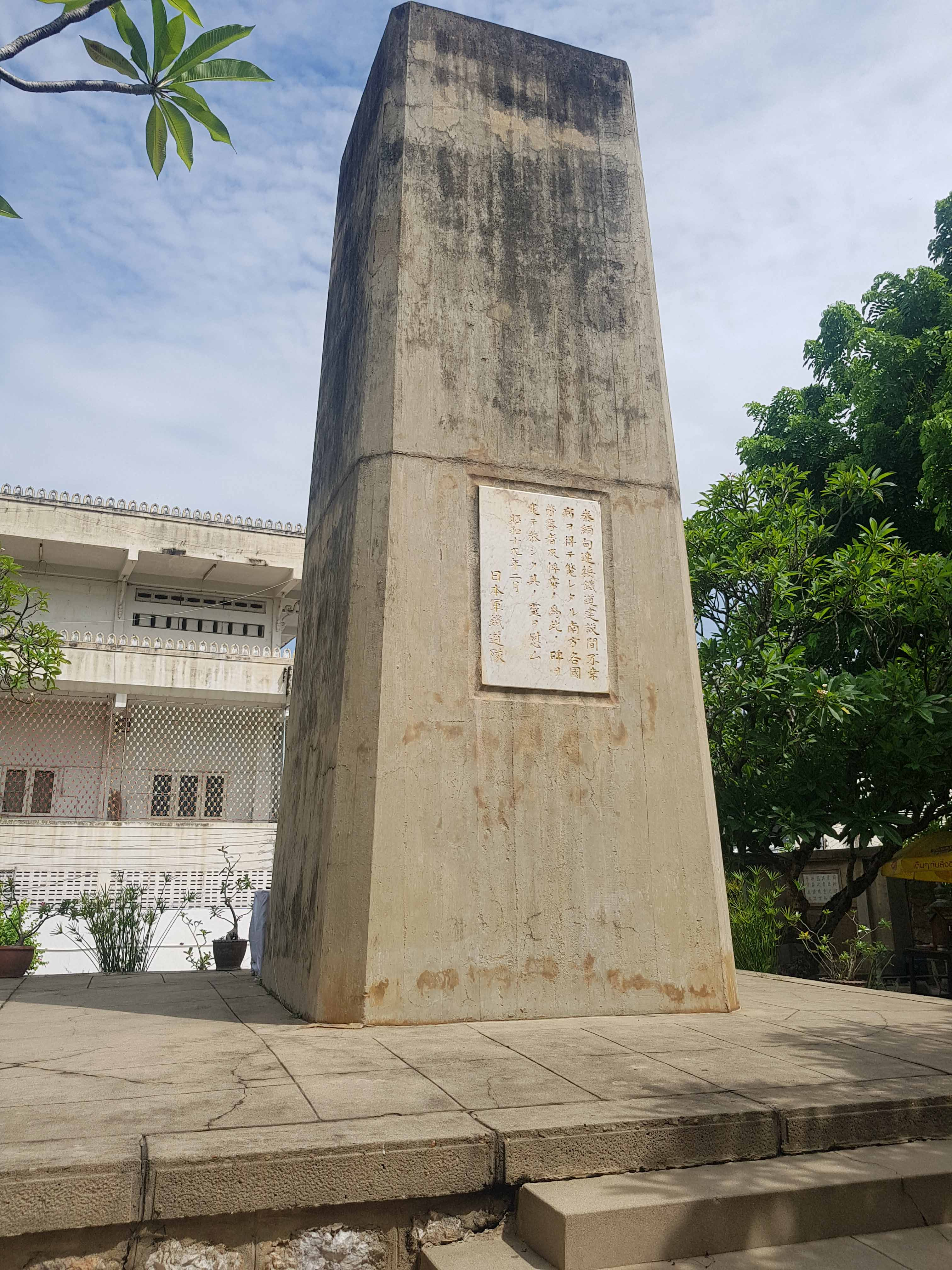 Cenotaph for Asian and POWs workers, built by Japanese Army Railroad Corps on February 1944. Near Railway Bridge in Kanchanaburi, Thailand